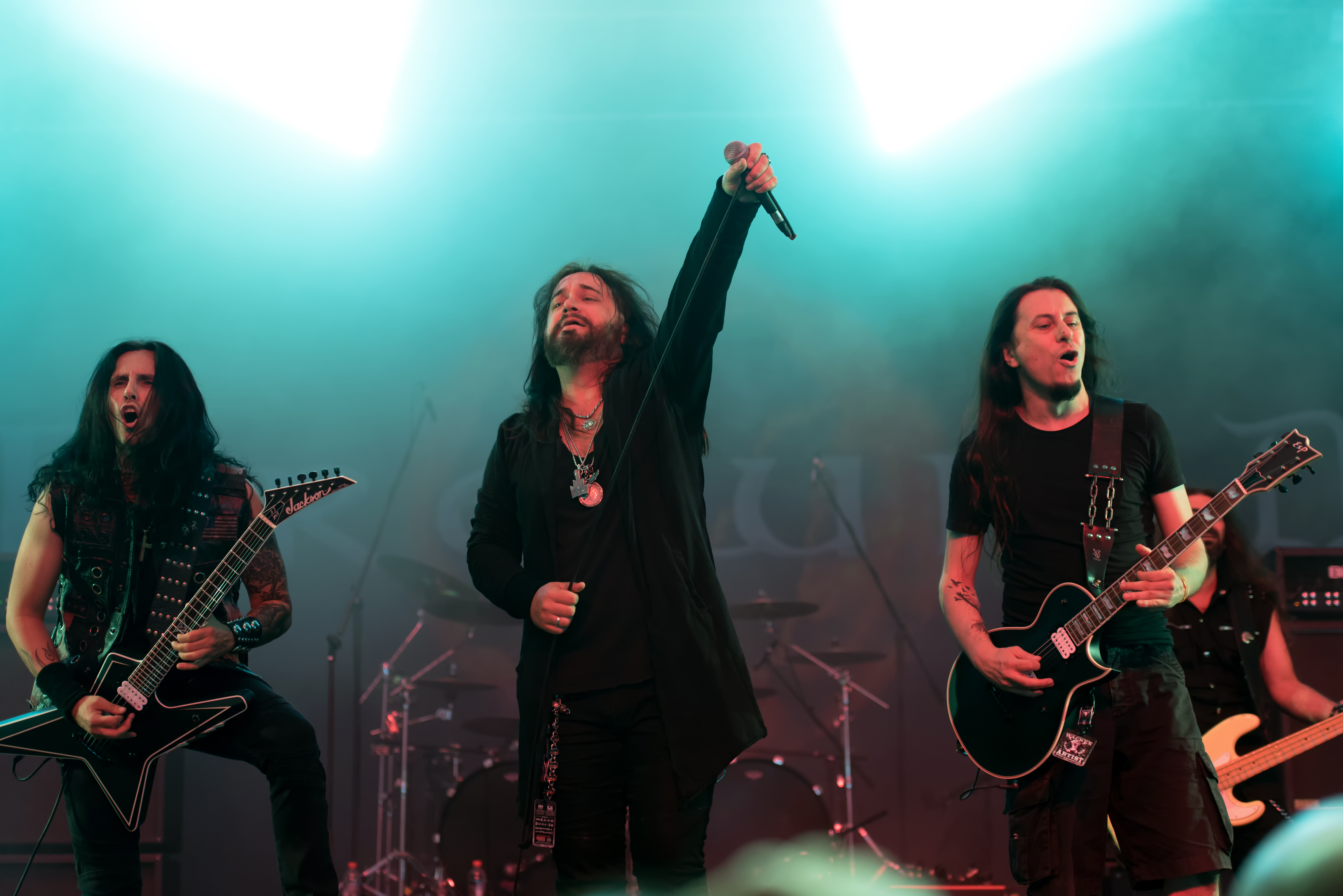 Firewind beim Wacken Open Air 2018